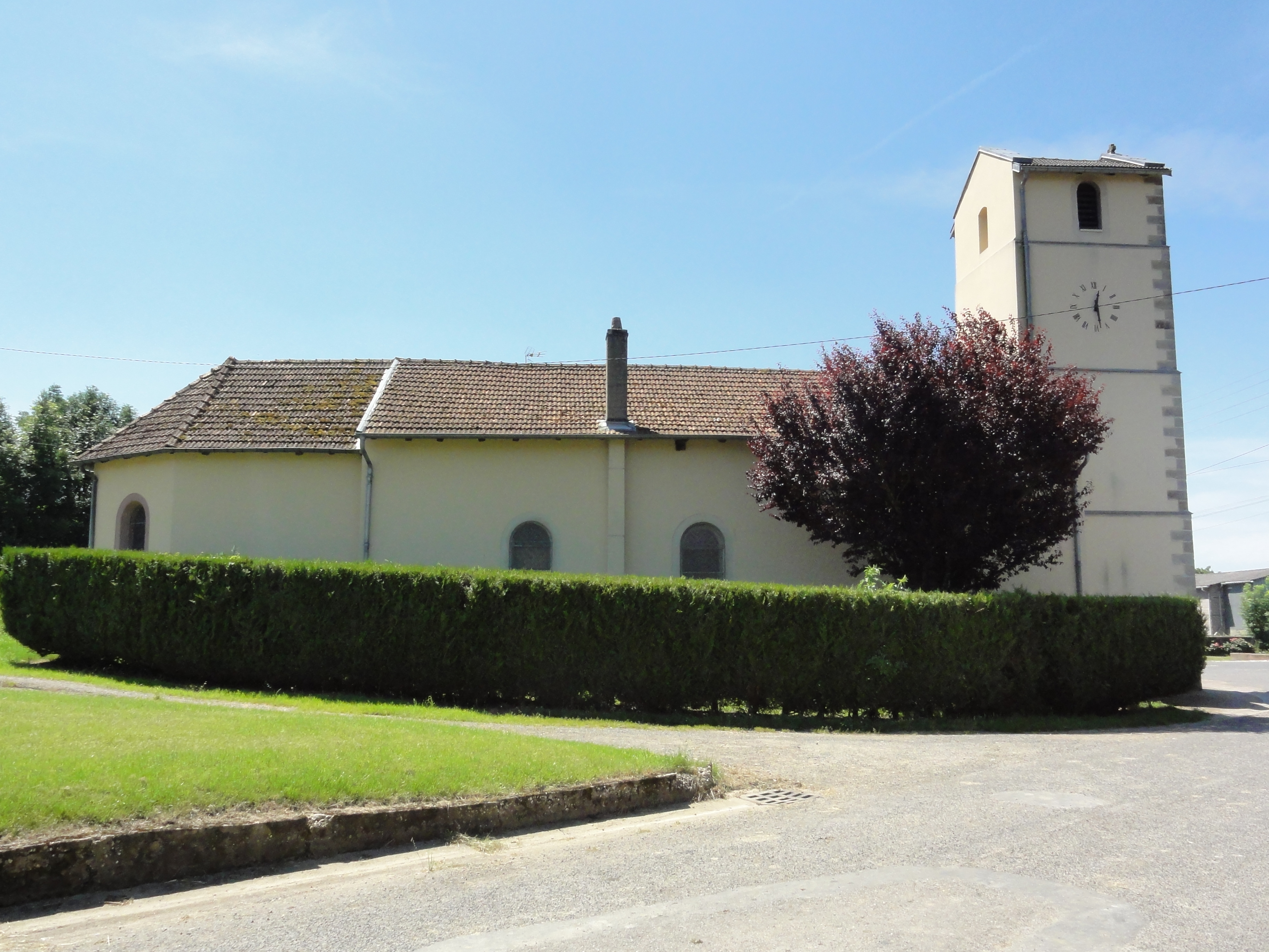 Buriville (M-et-M) église